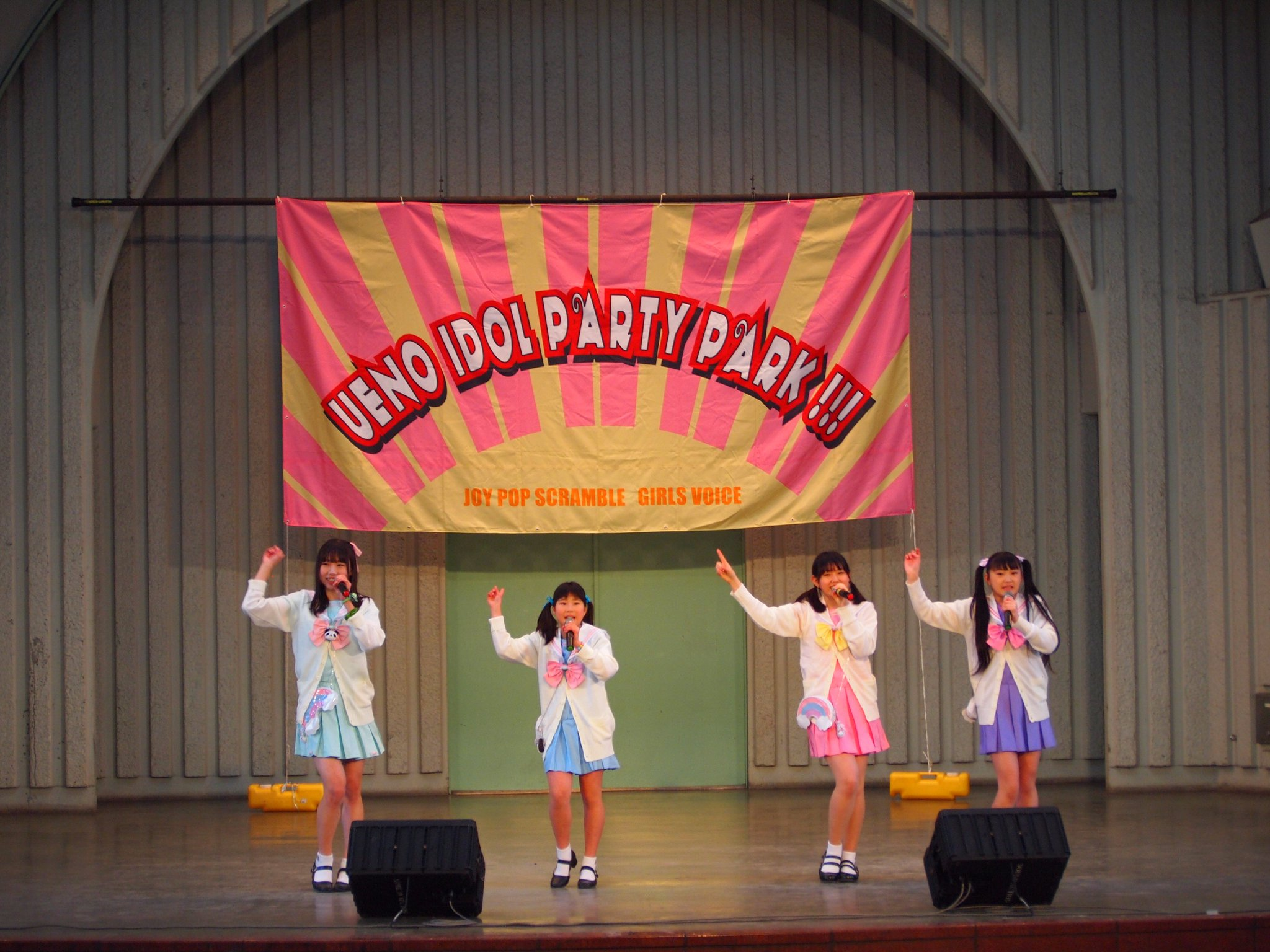 bonbon ange@上野公園水上音楽堂